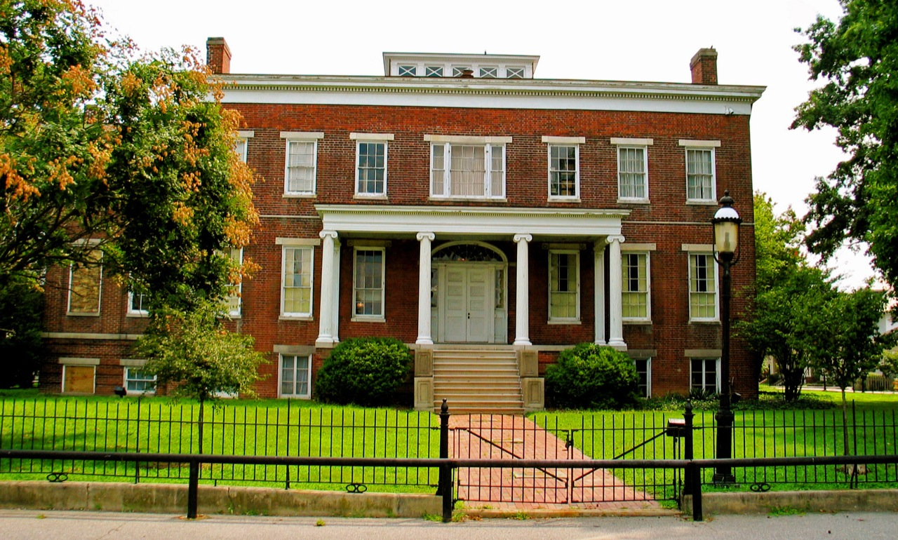 Petersburg VA